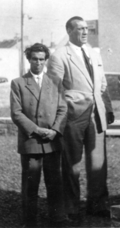 Francesco Libonati e Primo Carnera a Quaregnon in Belgio. Primo Carnera venne in quell'occasione a deporre un mazzo di fiori ai piedi del monumento dedicato ai minatori di tutti i paesi ("Il minatore di tutti i paesi")